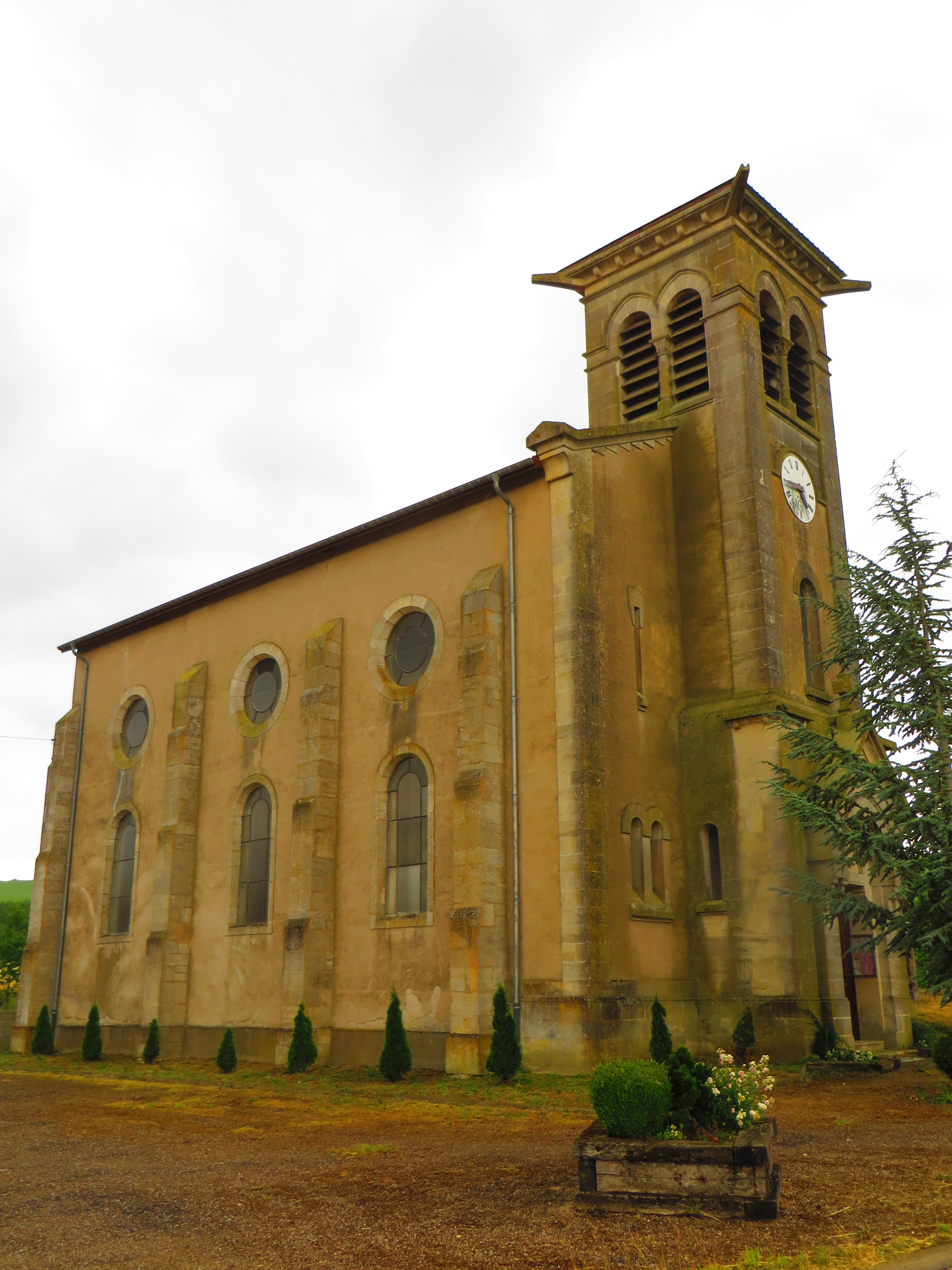 Champneuville Église de l'Assomption de Neuville